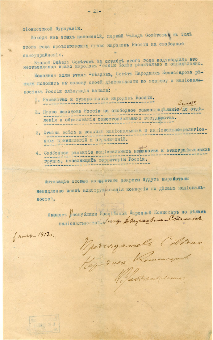 Venemaa rahvaste õiguste deklaratsioon (lk 2(2))